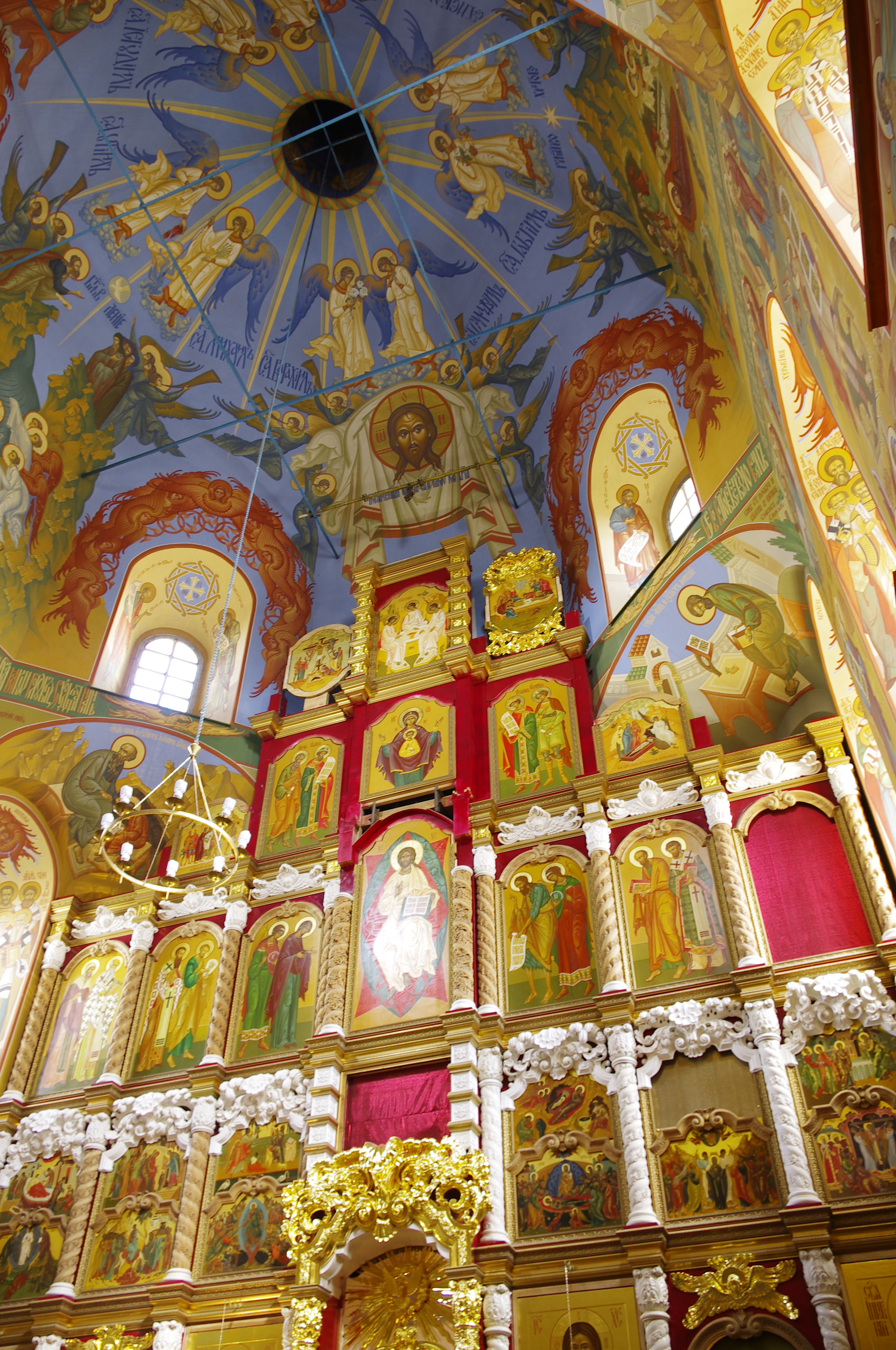 Lato 2013.